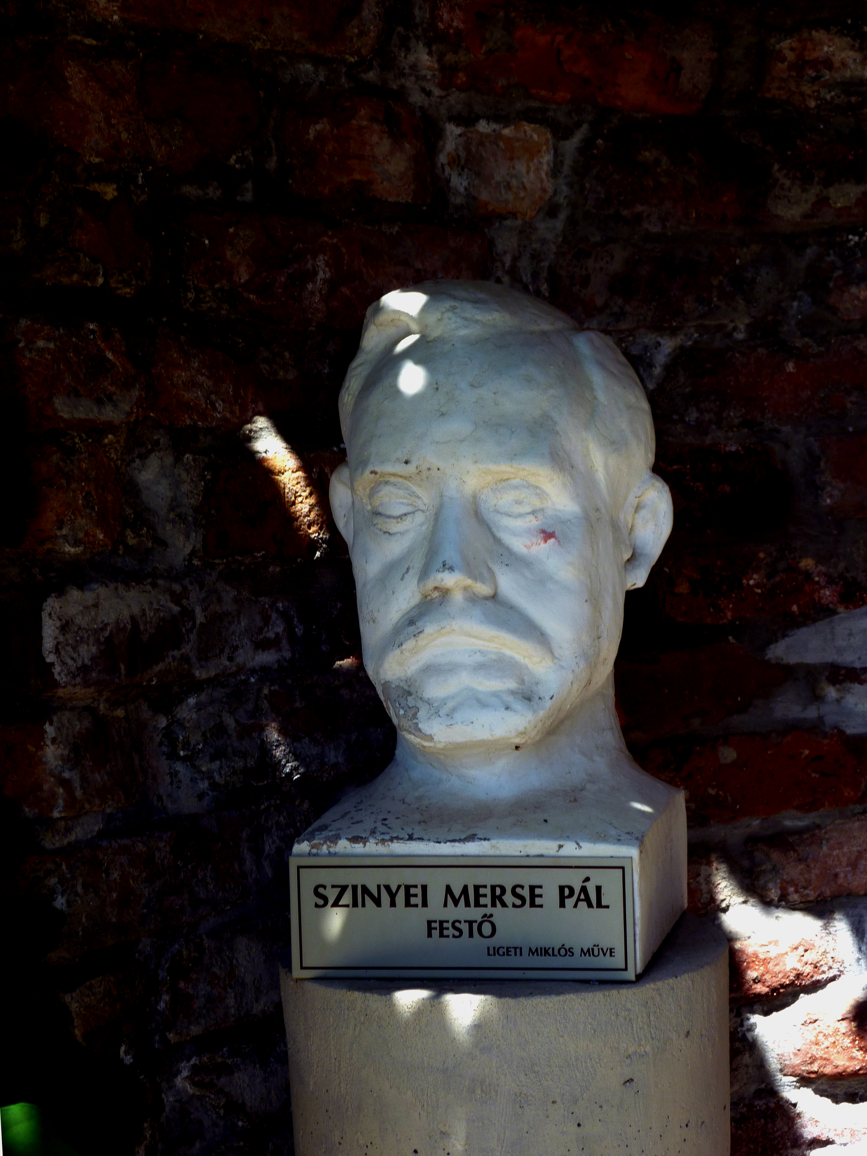 Ligeti Miklós: Szinyei Merse Pál mellszobra (Bory-vár, Székesfehérvár)